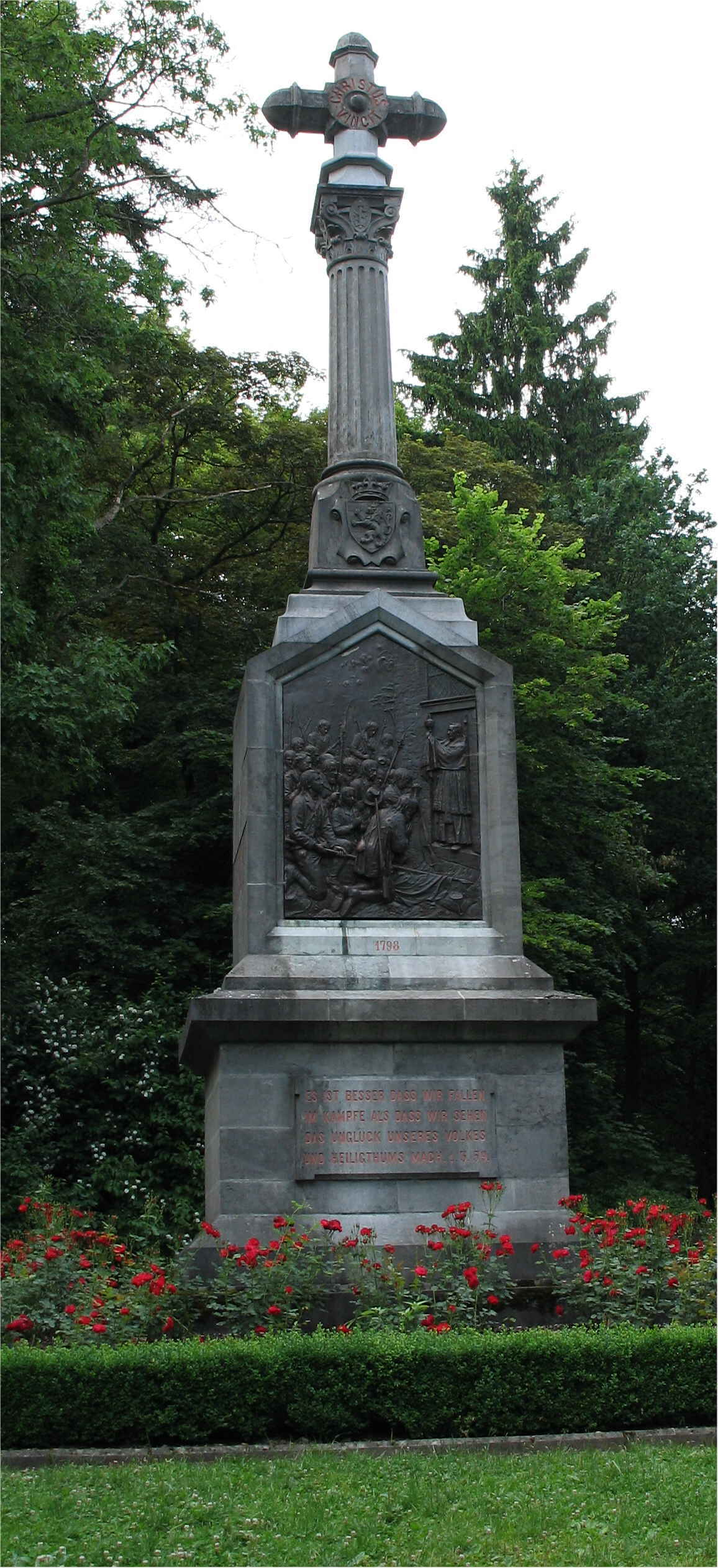 Monument vum Klëppelkrich bei der Abtei vu Klierf, Südsäit.